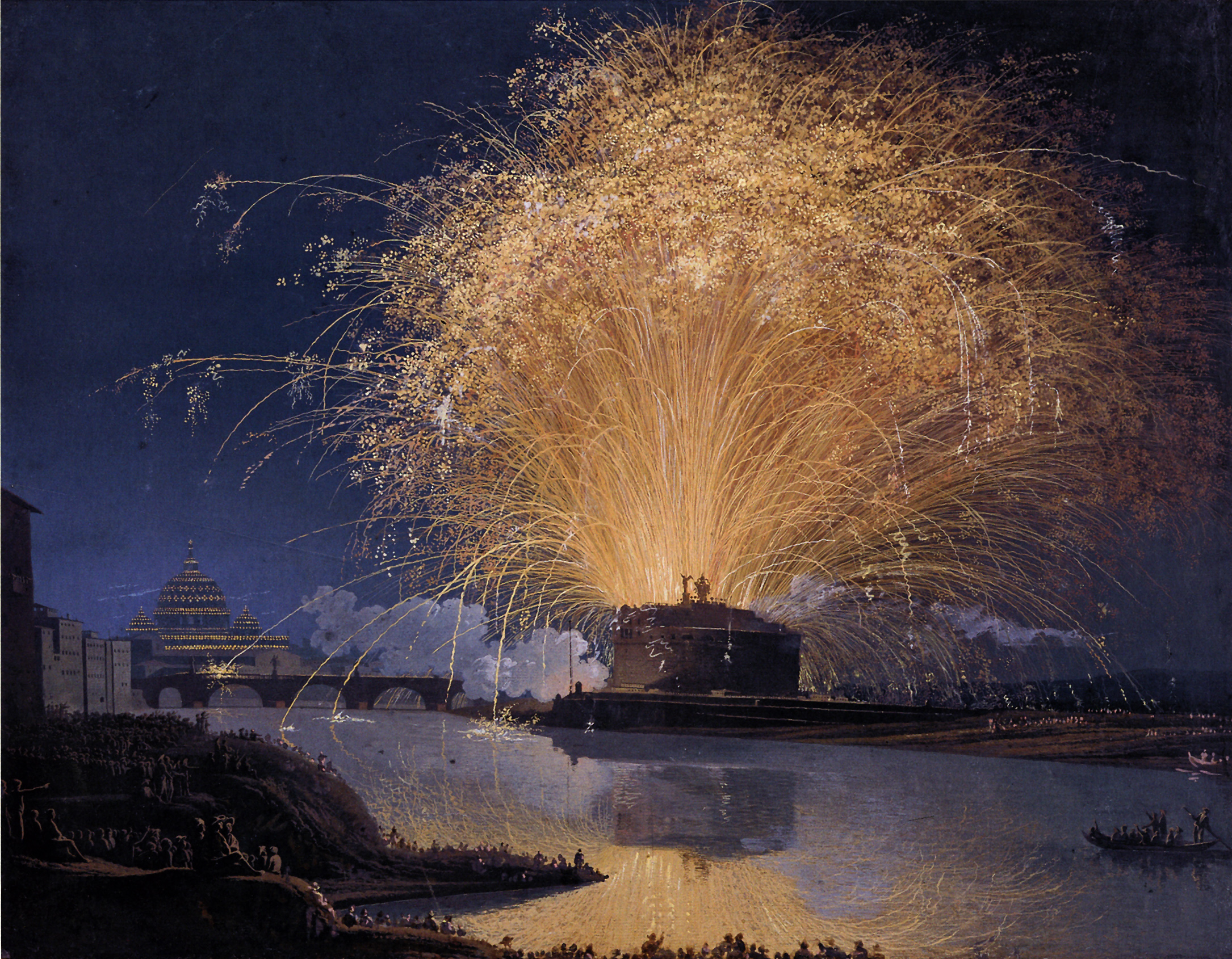 Fireworks over Castel Sant'Angelo in Rome, 1775label QS:Lde,"Feuerwerk auf der Engelsburg in Rom, 1775"label QS:Len,"Fireworks over Castel Sant'Angelo in Rome, 1775"label QS:Lit,"Fuochi d'artificio su Castel Sant'Angelo a Roma, 1775"